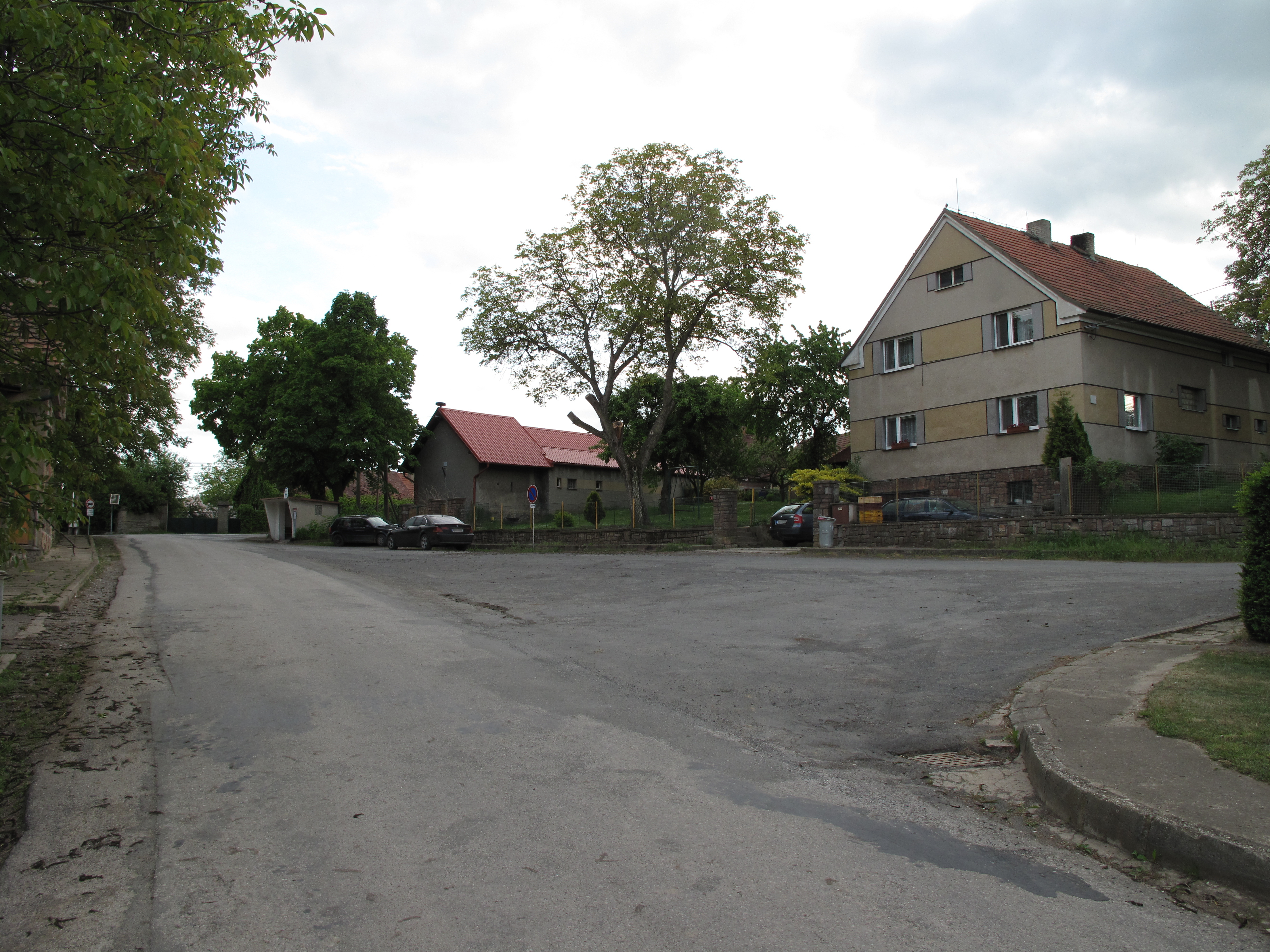 Křižovatka v Nesvačilech. Okres Beroun, Česká republika.